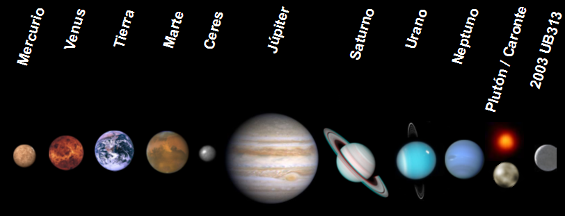 Sistema Solar. Propuesta 2006 de reconocer 12 planetas no aceptada por la IAU (IAU)